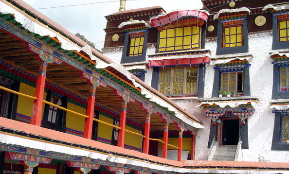 Монастырь Дрепунг около Лхаса в Тибете